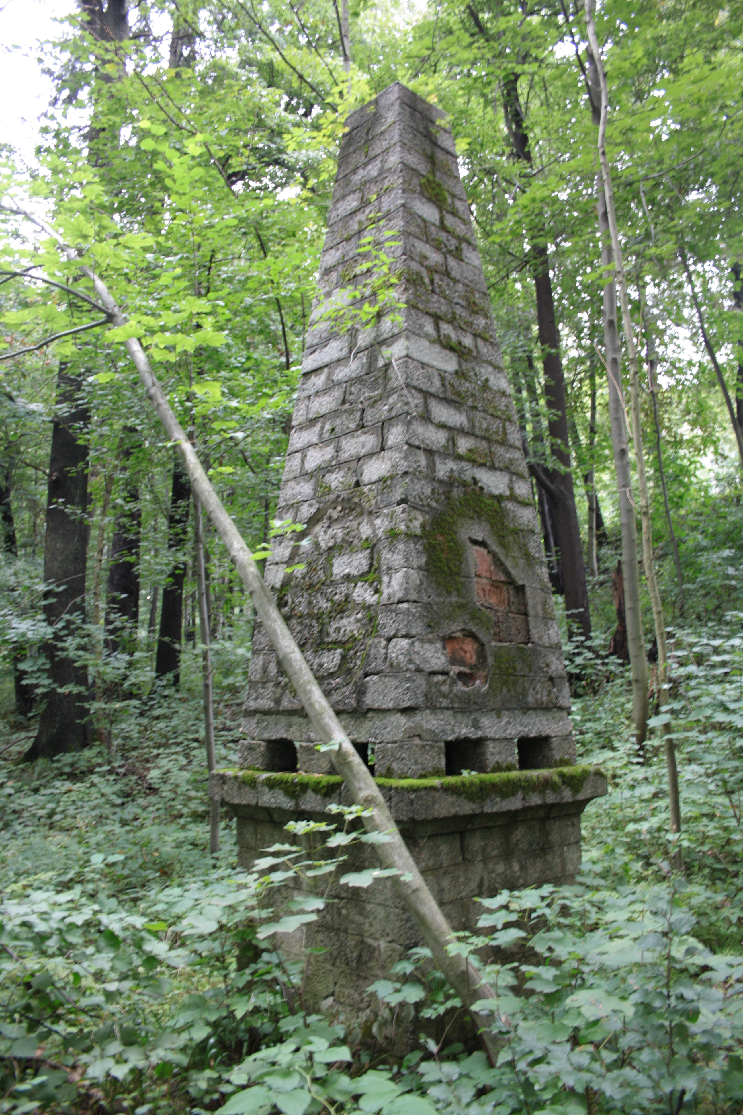 Mohyla v parku v Lázních Libverdě.